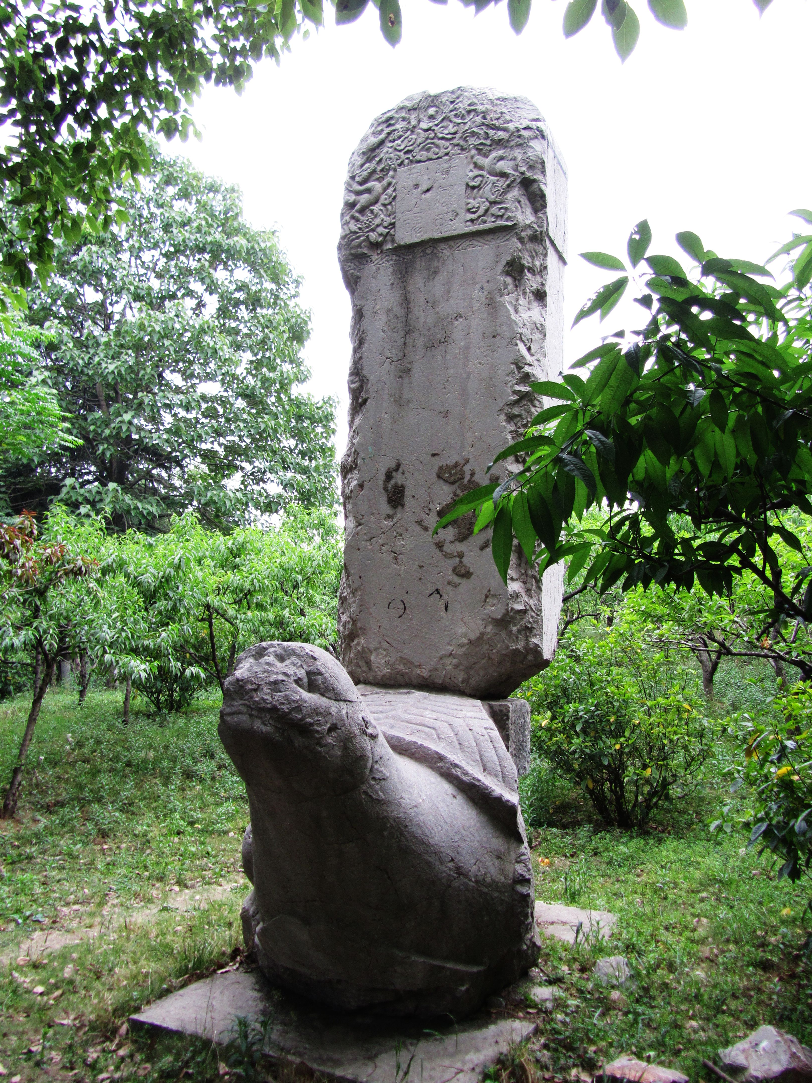 白马公园明代神乐观澧泉井碑。